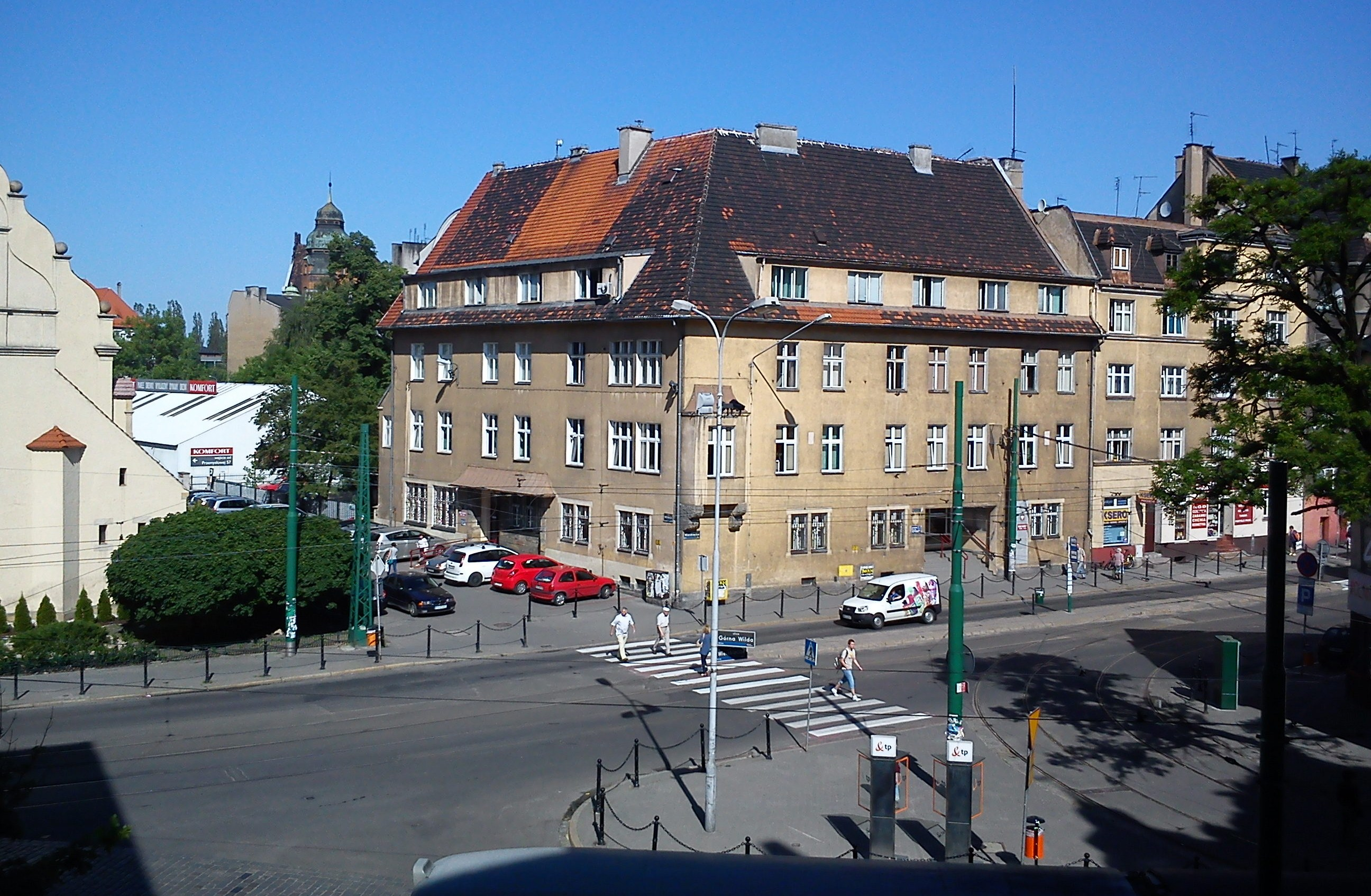 Rynek Wildecki, Poznań, Urząd Skarbowy. Dawny dom ewangelickiej parafii św. Mateusza i siedziba Ewangelickiego Seminarium Kaznodziejskiego i Szkoły Teologicznej w Poznaniu przy ul. Wierzbięcice 45